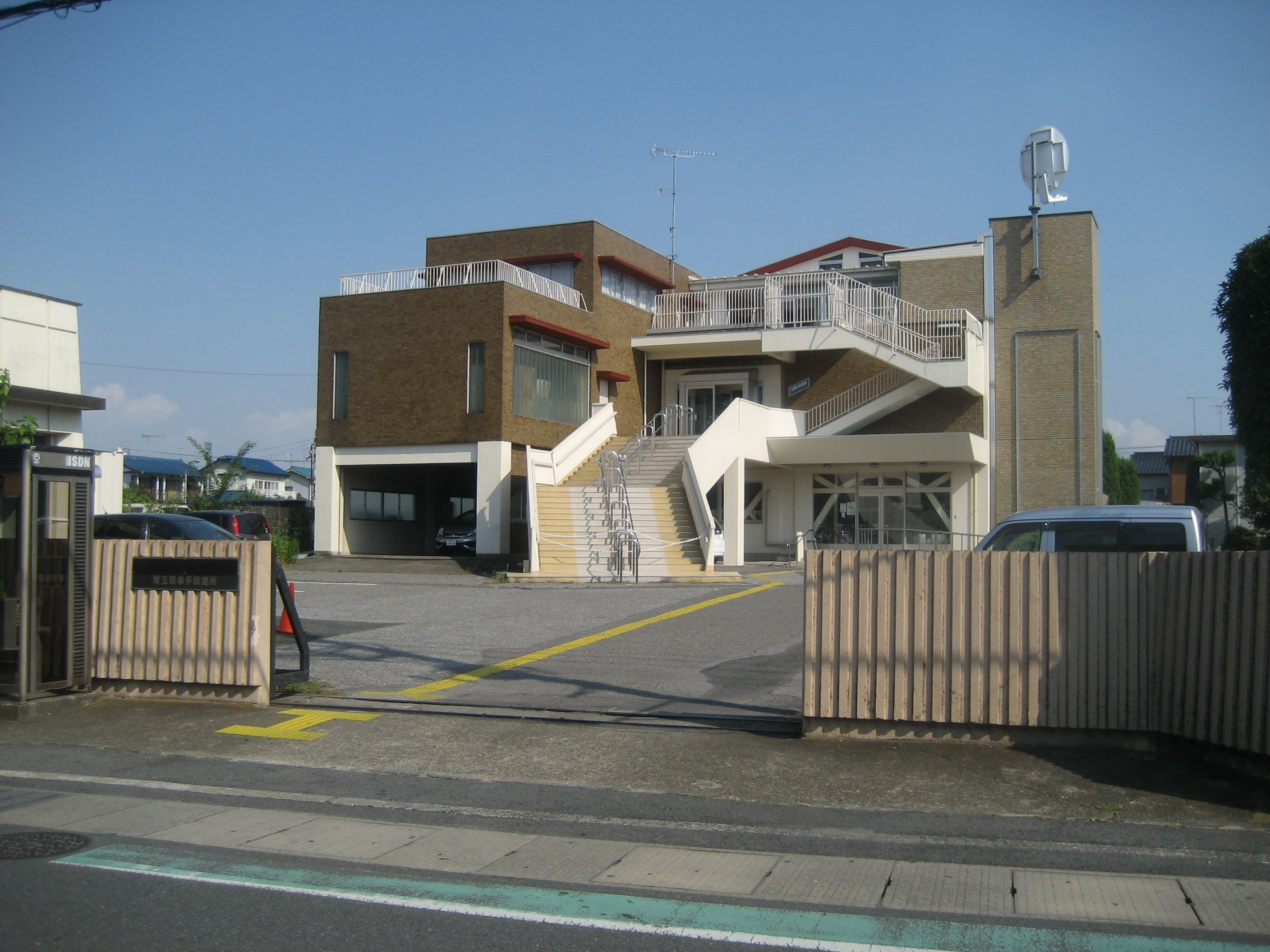 埼玉県幸手保健所庁舎